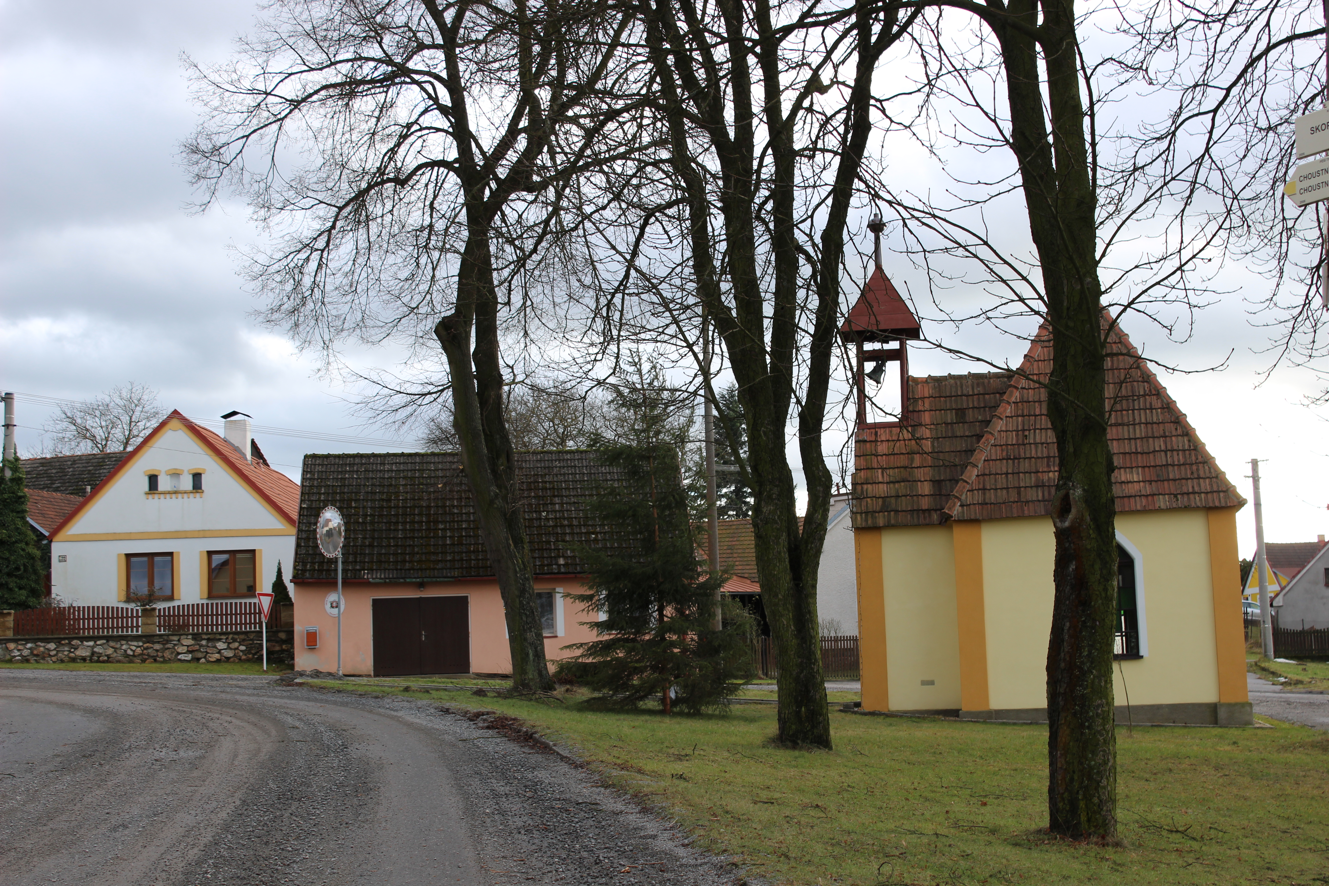 Pohled na část návsi. Skopytce (německy Skopitetz) v okrese Tábor, kraj Jihočeský. Česká republika.